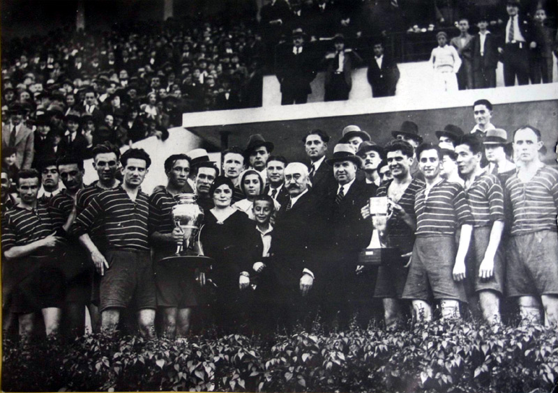 Ripensia in 1934 30.11.1934 - Bucuresti - O.N.E.F. - Finala Cupei Romaniei FC Ripensia - Universitatea Cluj 5-0 (3-0) dupa terminarea partidei, primul-ministru Vaida Voivod, impreuna cu sotia, inmaneaza "Cupa Romaniei" lui Ghiţă Ciolac, capitanul echipei